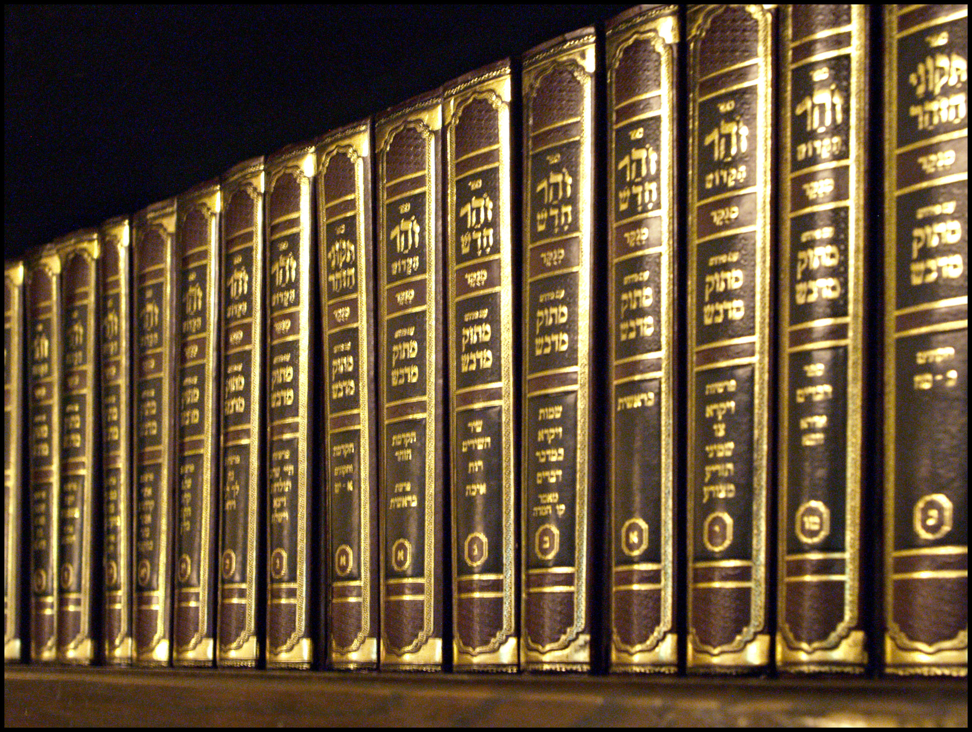 מהדורה מנוקדת ומפורשת של הזוהר, עם פירוש דניאל פריש מתוק מדבש. צולם בירושלים.